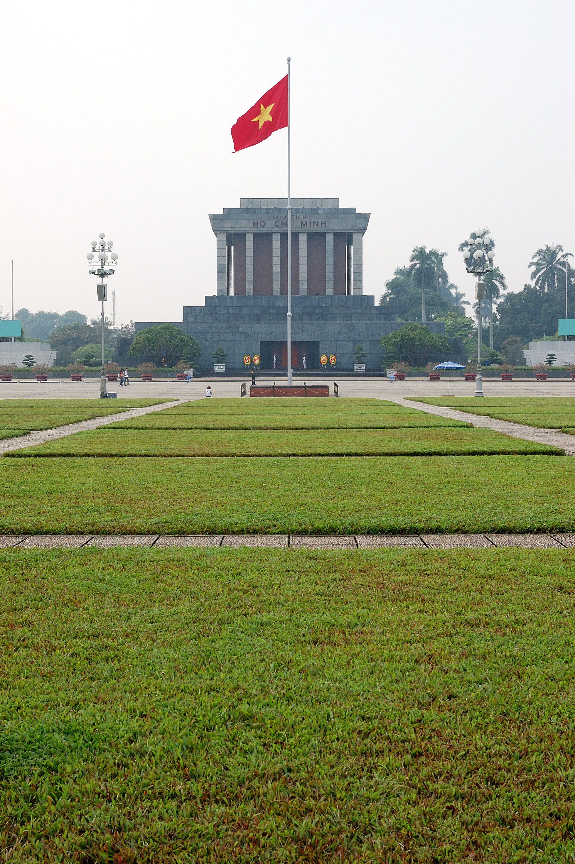 Hanoi, Vietnam 2009